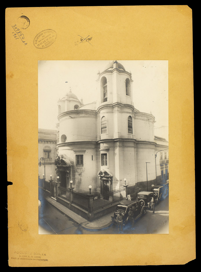 Português do Brasil: Foto Igreja São Pedro dos Clérigos, Rio de Janeiro, antes da demolição.